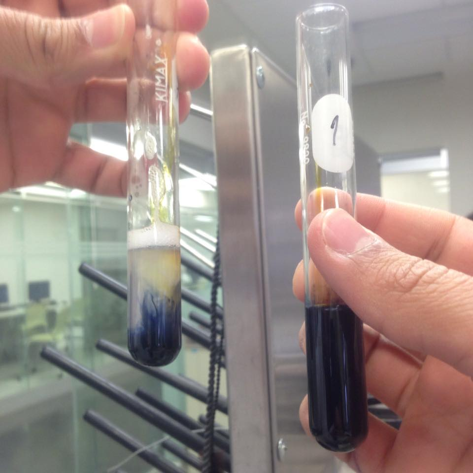 Tubo 1. Lugol y almidón; Tubo 2. Lugol, Glucosa, Almidón y Amilasa. Separación del almión en glucosa, por enzima amilasa; adhesión del lugol a los enlaces glucosídicos del almidón Laboratorios, Tecnológico de Monterrey Campus Ciudad de México.